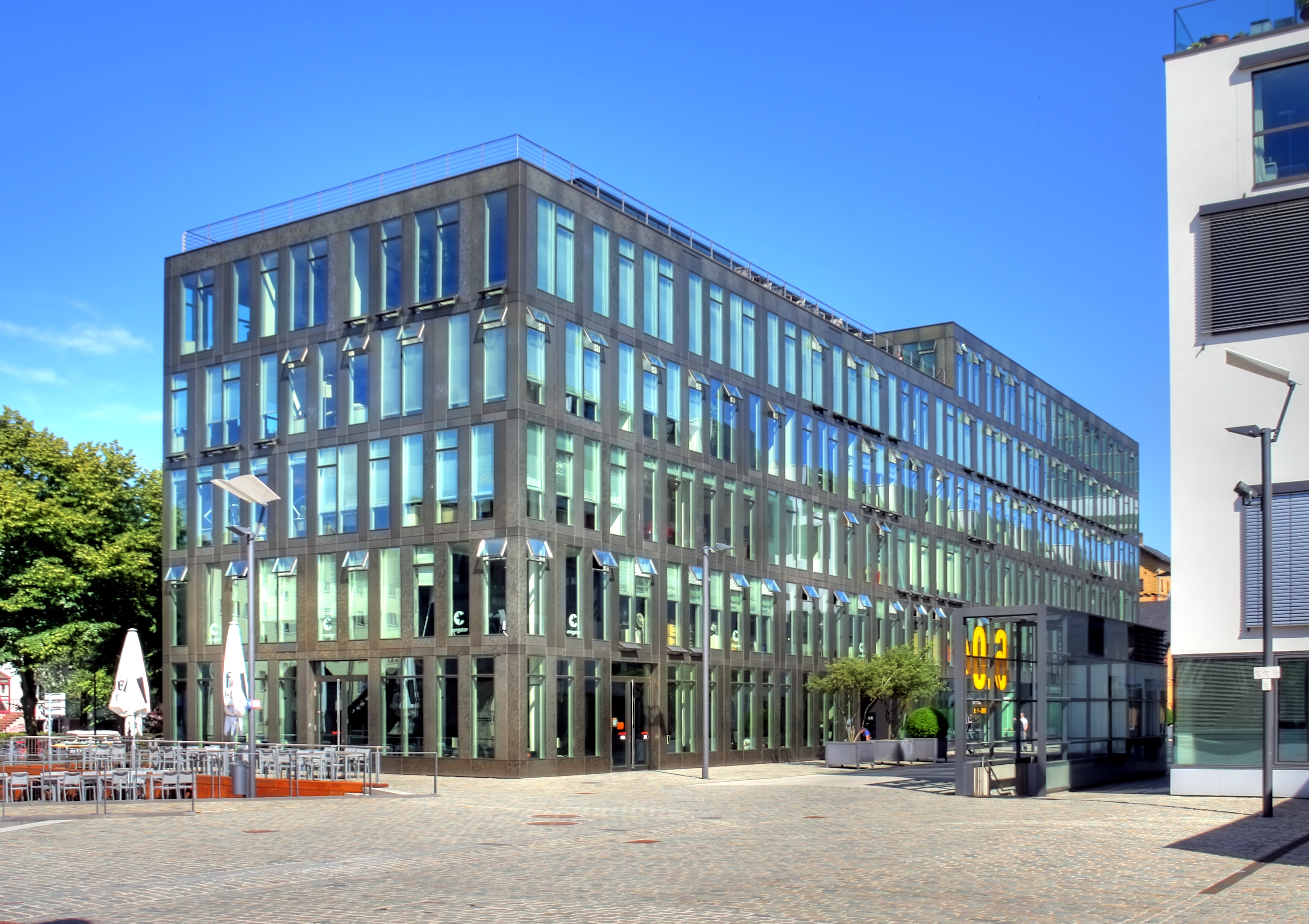 Rheinauhafen Köln. „Kontor19“, Deutschlandzentrale von Congstar. Architekten: Gatermann + Schossig, Bauzeit: 2004-2006